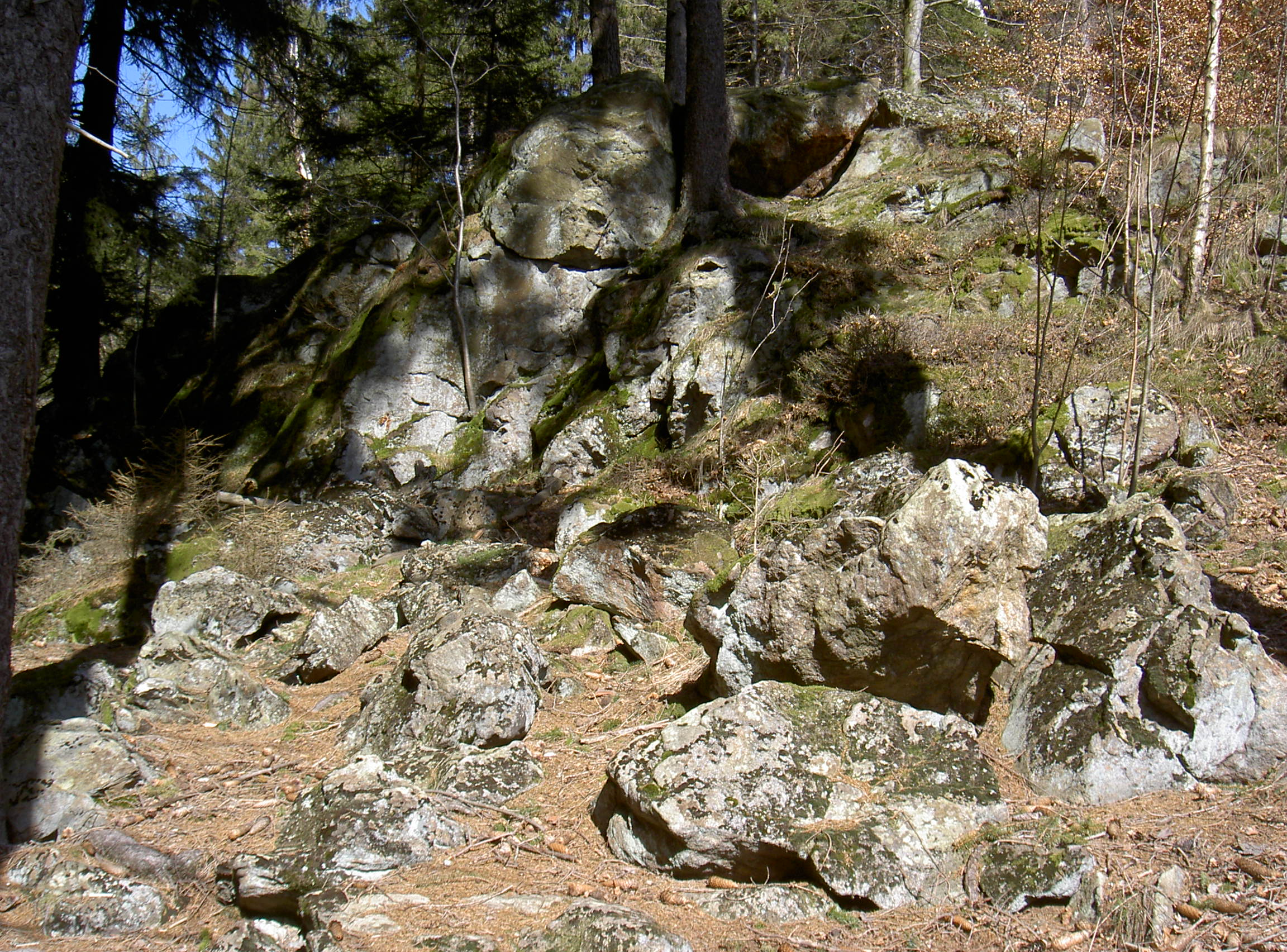 Geotop Magdalenafels bei der Magdalenenkapelle Schönsee